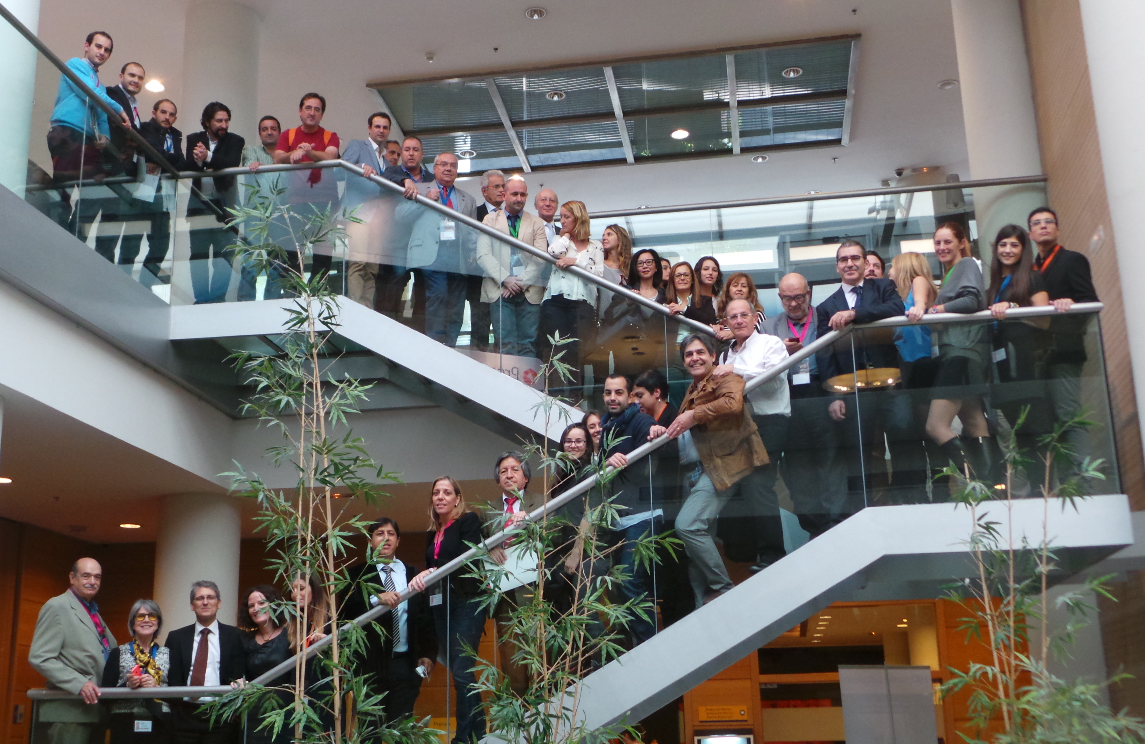 Reunión anual de la Fundación García Cugat. Barcelona Octubre 2015